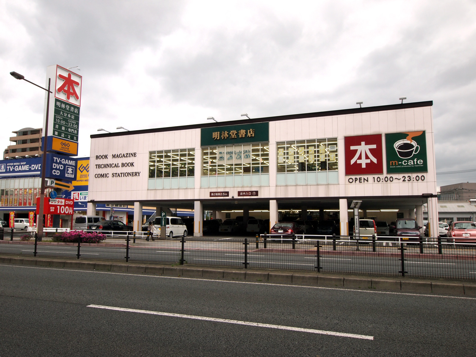 明林堂大分本店（大分県大分市）